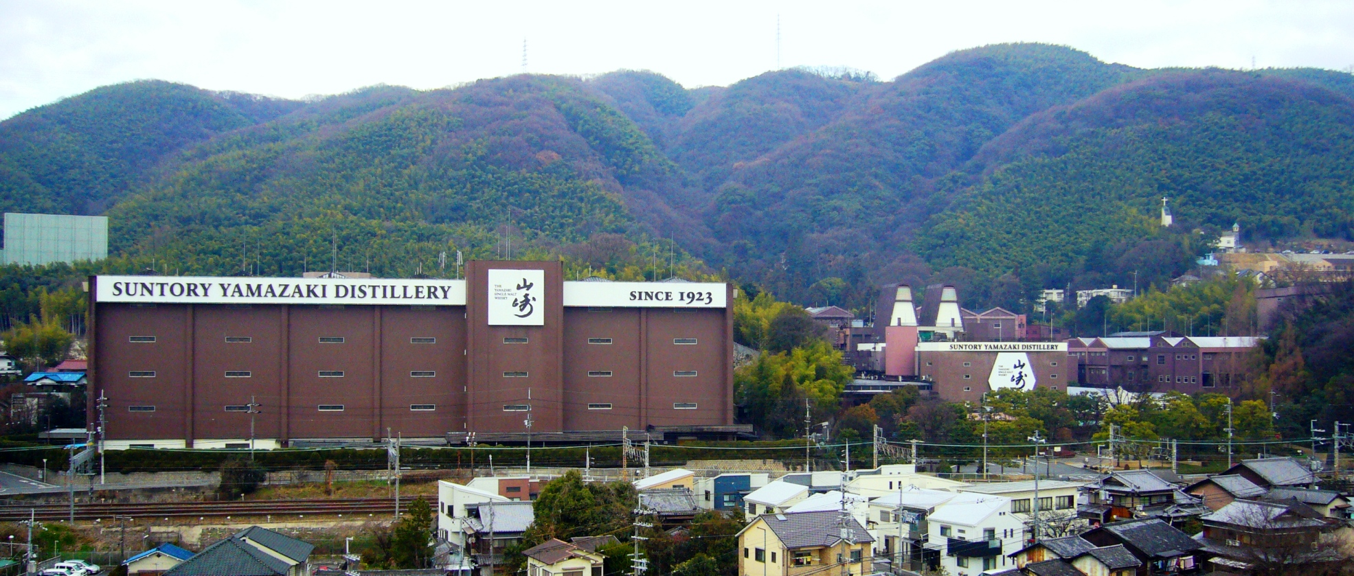 大阪府三島郡島本町山崎にあるサントリー山崎蒸溜所。日本初の本格的ウイスキー蒸溜所の遠景。2007年に蒸留所に掲げられている看板のマークが「響」マークから「山崎」の文字のロゴに改装された。また、英文も「SUNTORY WHISKEY」及び「SUNTORY WHISKEY DISTILLERY」から「SUNTORY YAMAZAKI DISTILLERY」に変更された。2009年1月4日に投稿者が撮影。